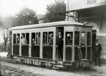 Tranvia San Bonifacio-Lonigo - Corsa prova A79 - 1923